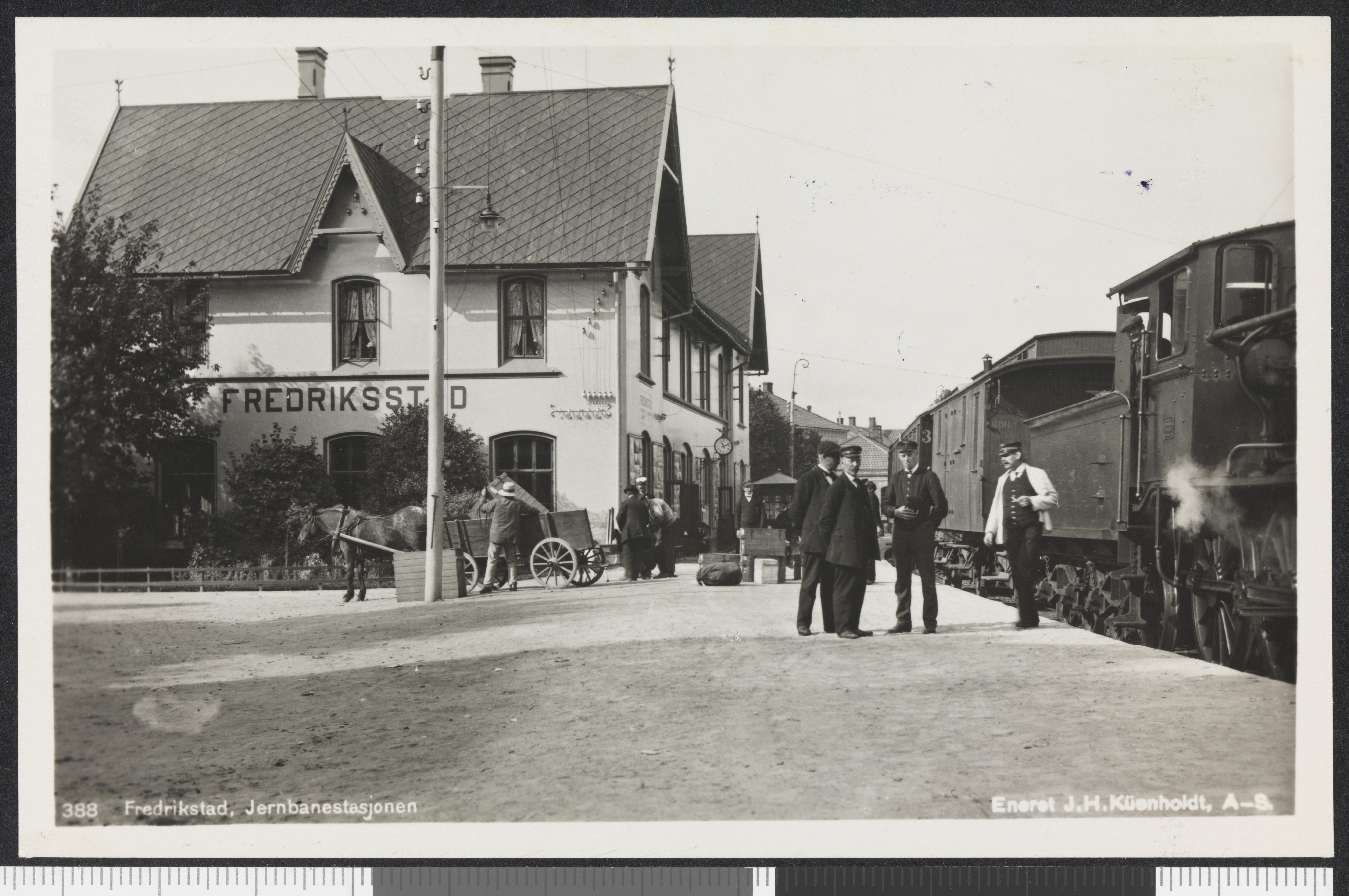 Bildet er hentet fra Nasjonalbibliotekets bildesamling Fredrikstad,Vestsiden, Fredrikstad, Østfold